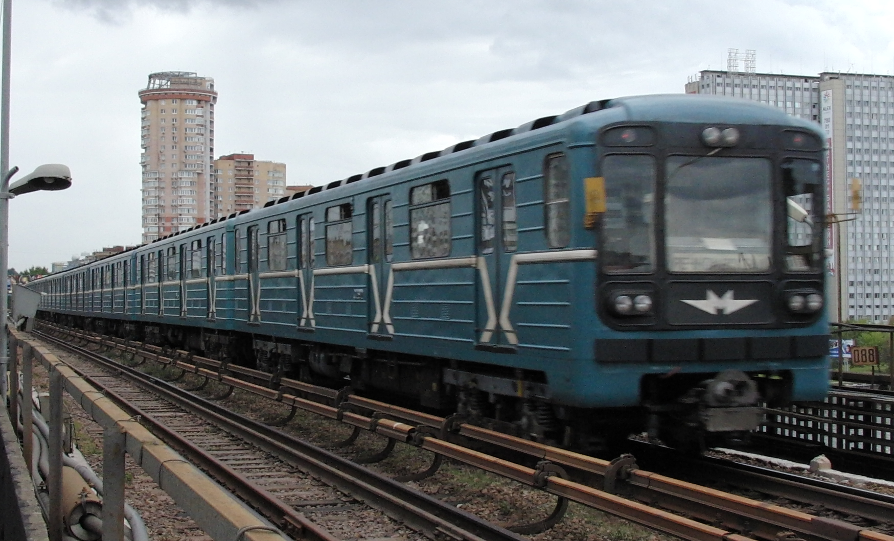 Nagatinsky Metro Bridge (Нагатинский метромост)